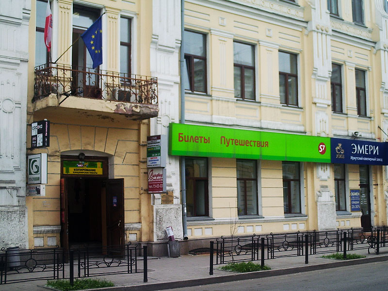 Офис продаж «S7 Ticket» и «S7 Tour» на улице Сухэ-Батора в Иркутске